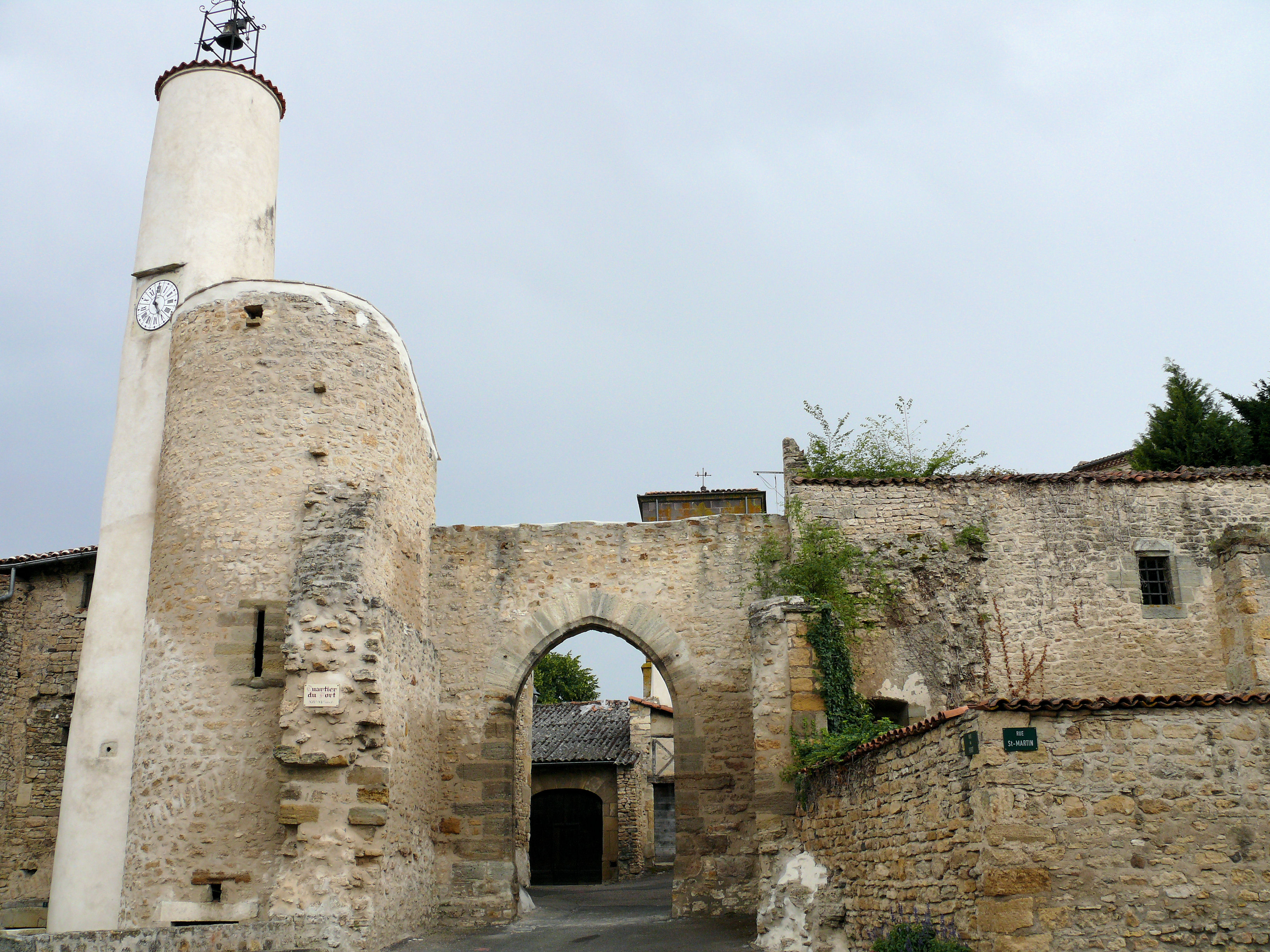 Chas, ancienne porte fortifiée (près de la mairie)